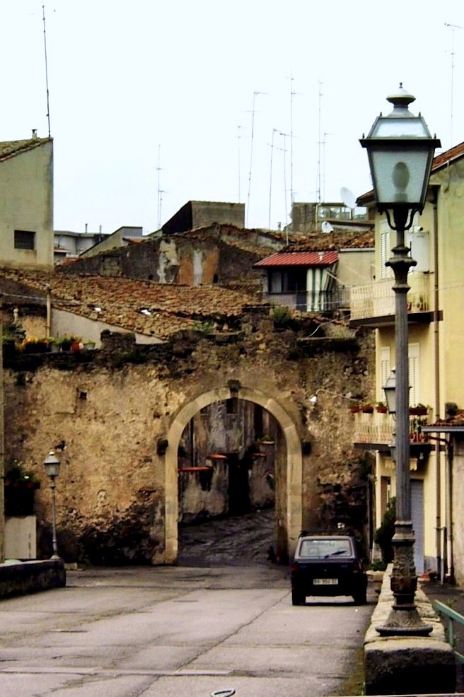 Mura di cinta e porte medioevali This is a photo of a monument which is part of cultural heritage of Italy.